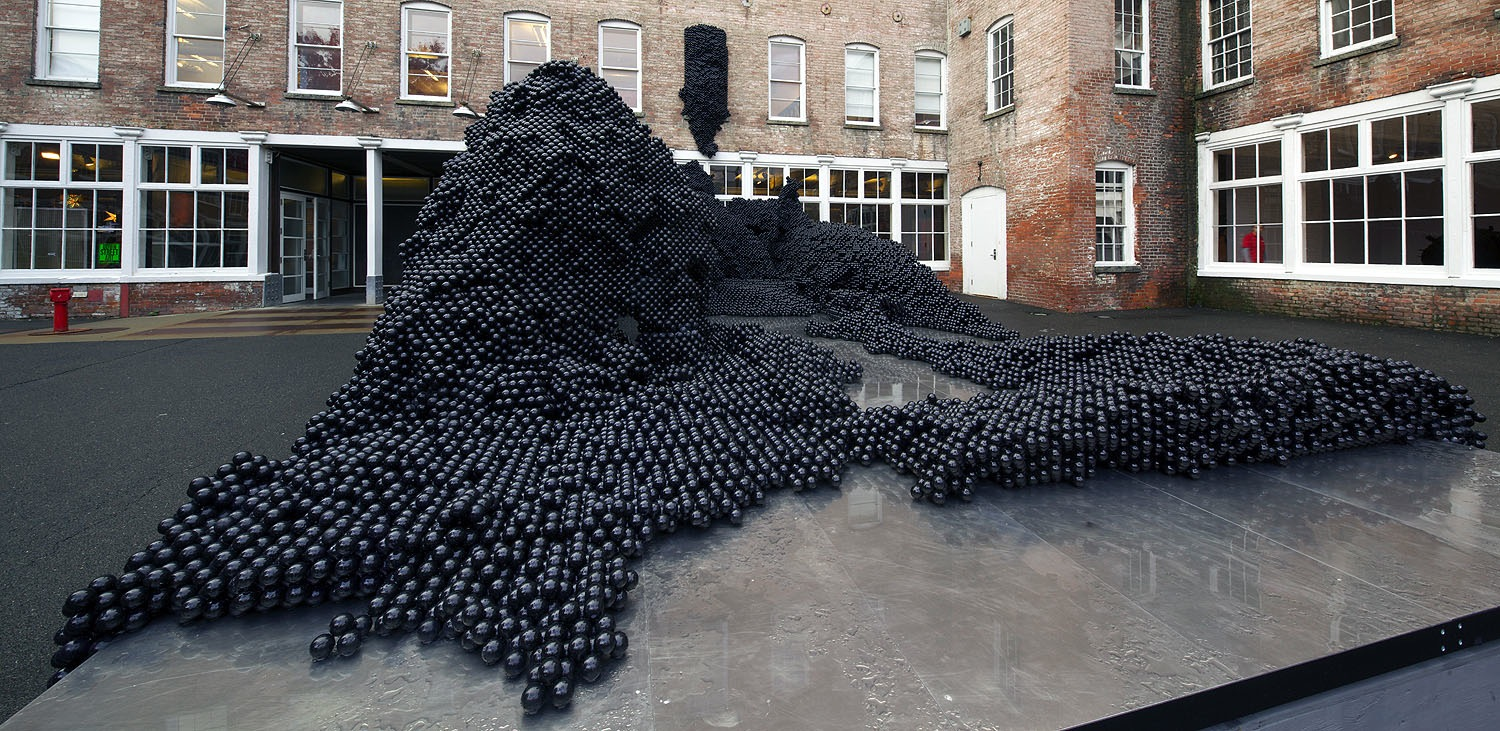 Geometrická smrt frekvence-141